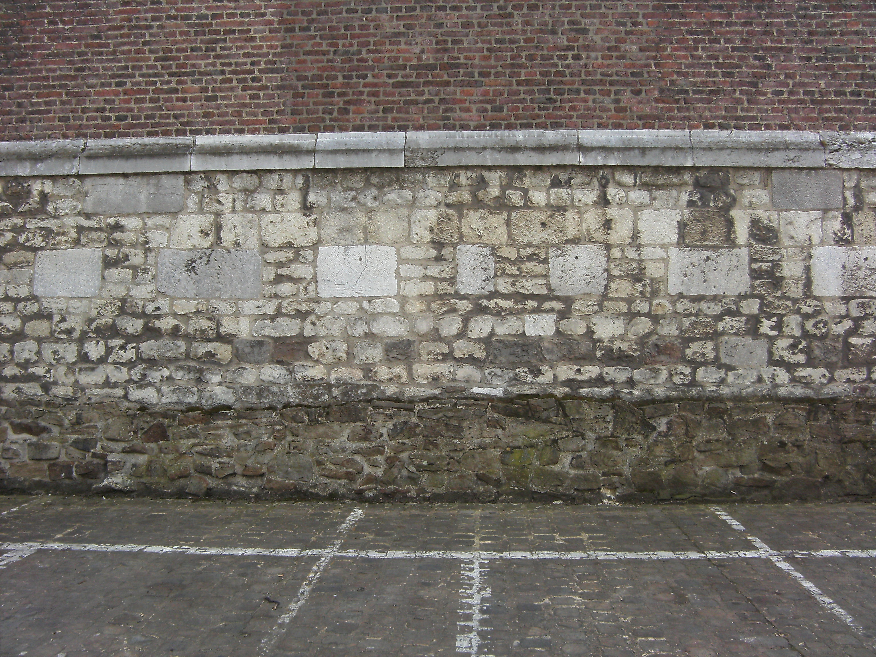 Jumet (Charleroi - Belgique) - Église Saint-Sulpice (1750-1753) - façade nord - remploi